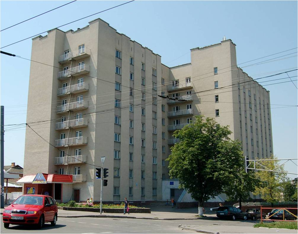 Студентський гуртожиток ХКТЕІ на вул.Камянецькій